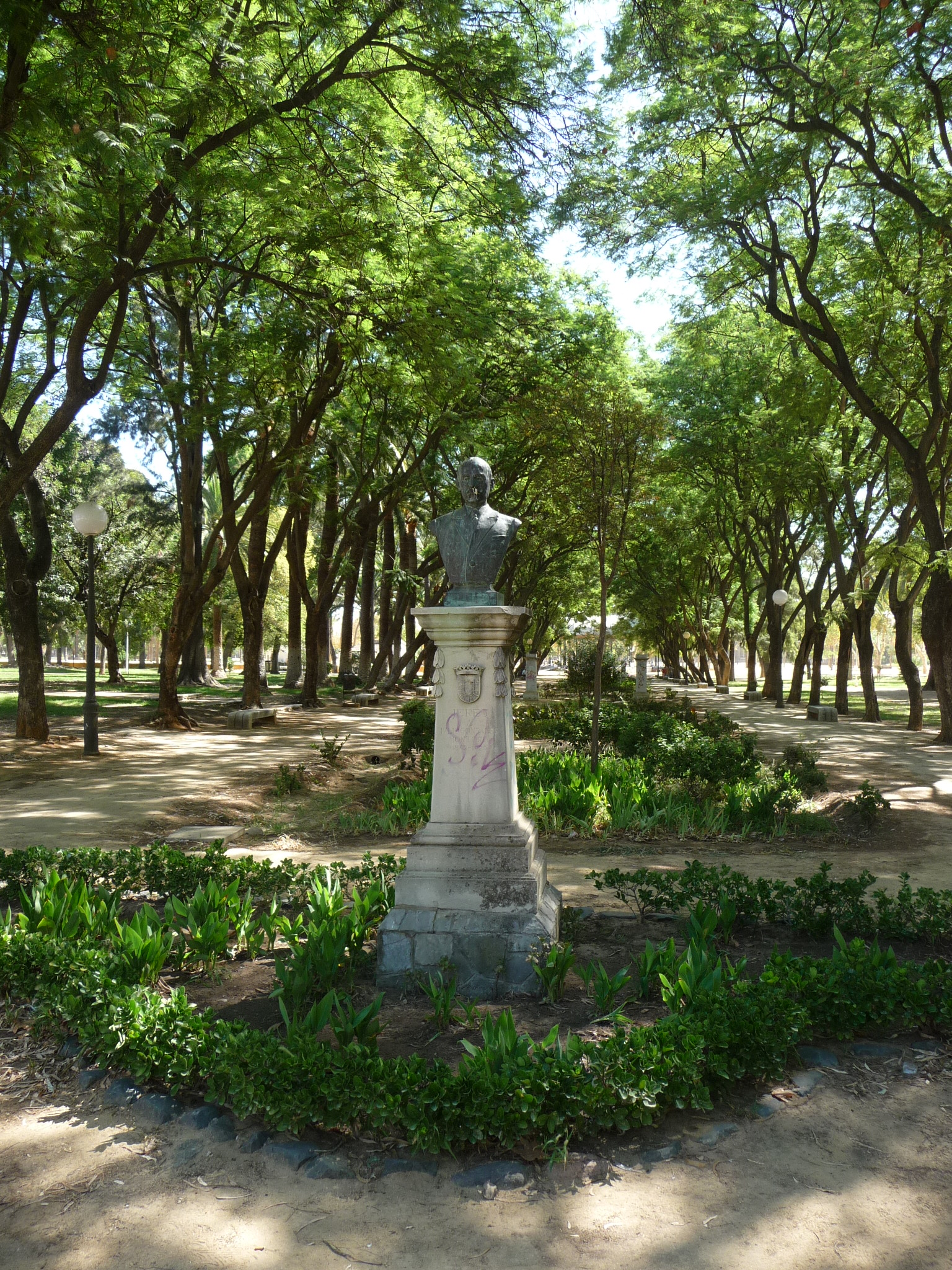 ParqueGonzalezHontoria-P1040522.JPG